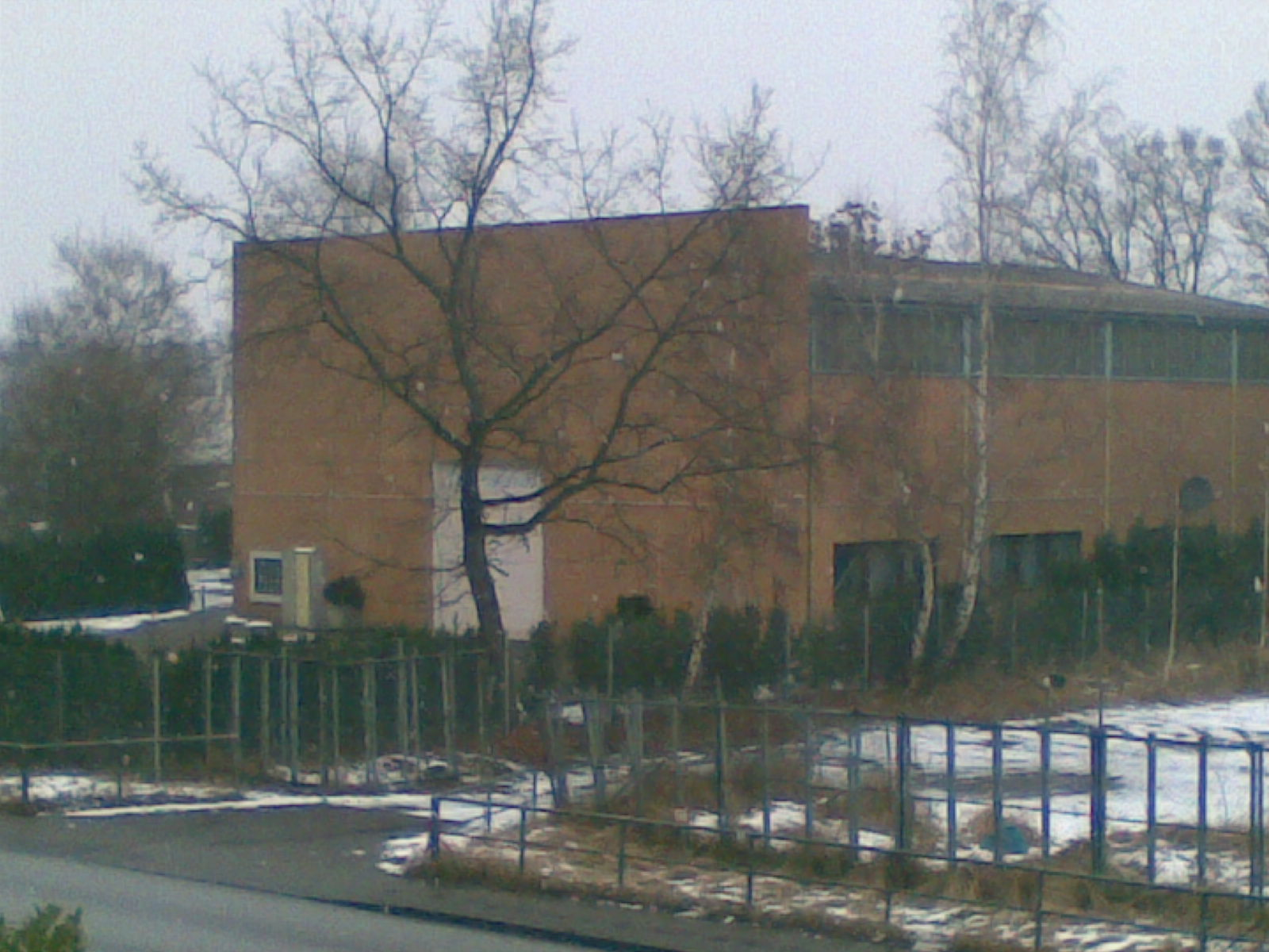 Die Bait-Ur-Rasheed Mosche in Schnelsen